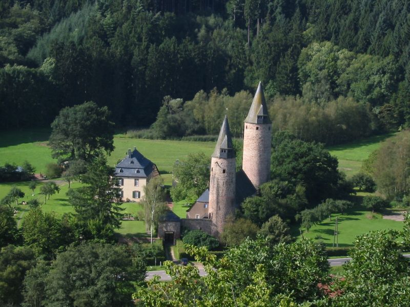 Wassburg Bruch